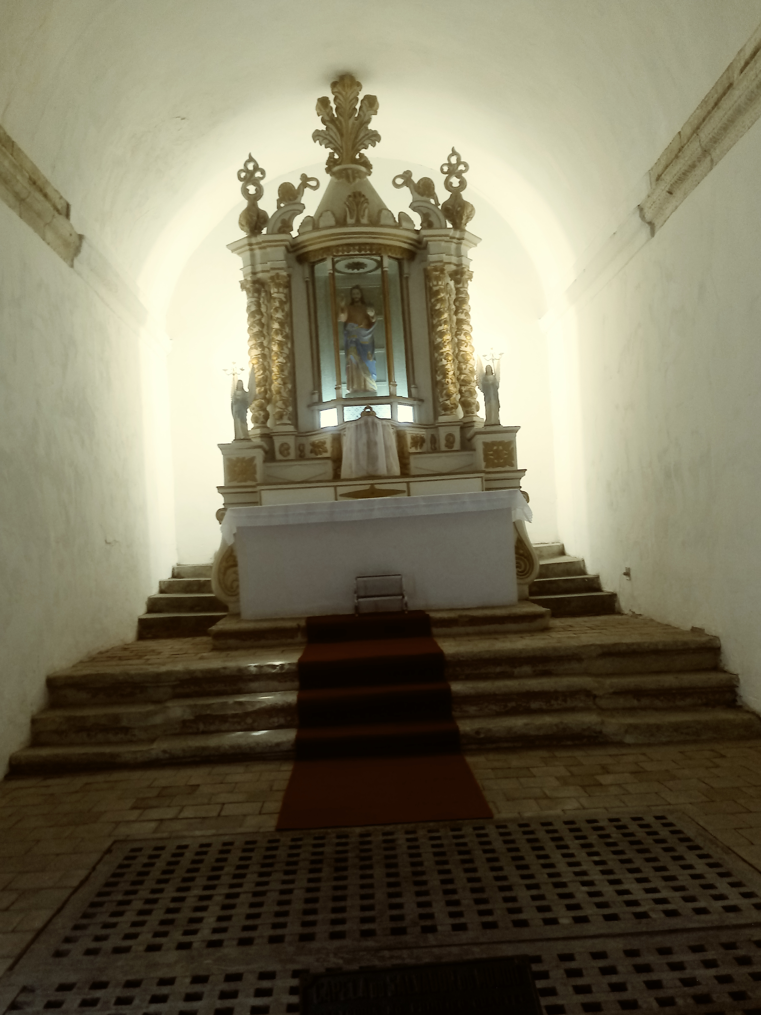 Capela do Salvador do mundo esculpida na Igreja da Misericórdia no Centro Histórico de João Pessoa na Paraíba.